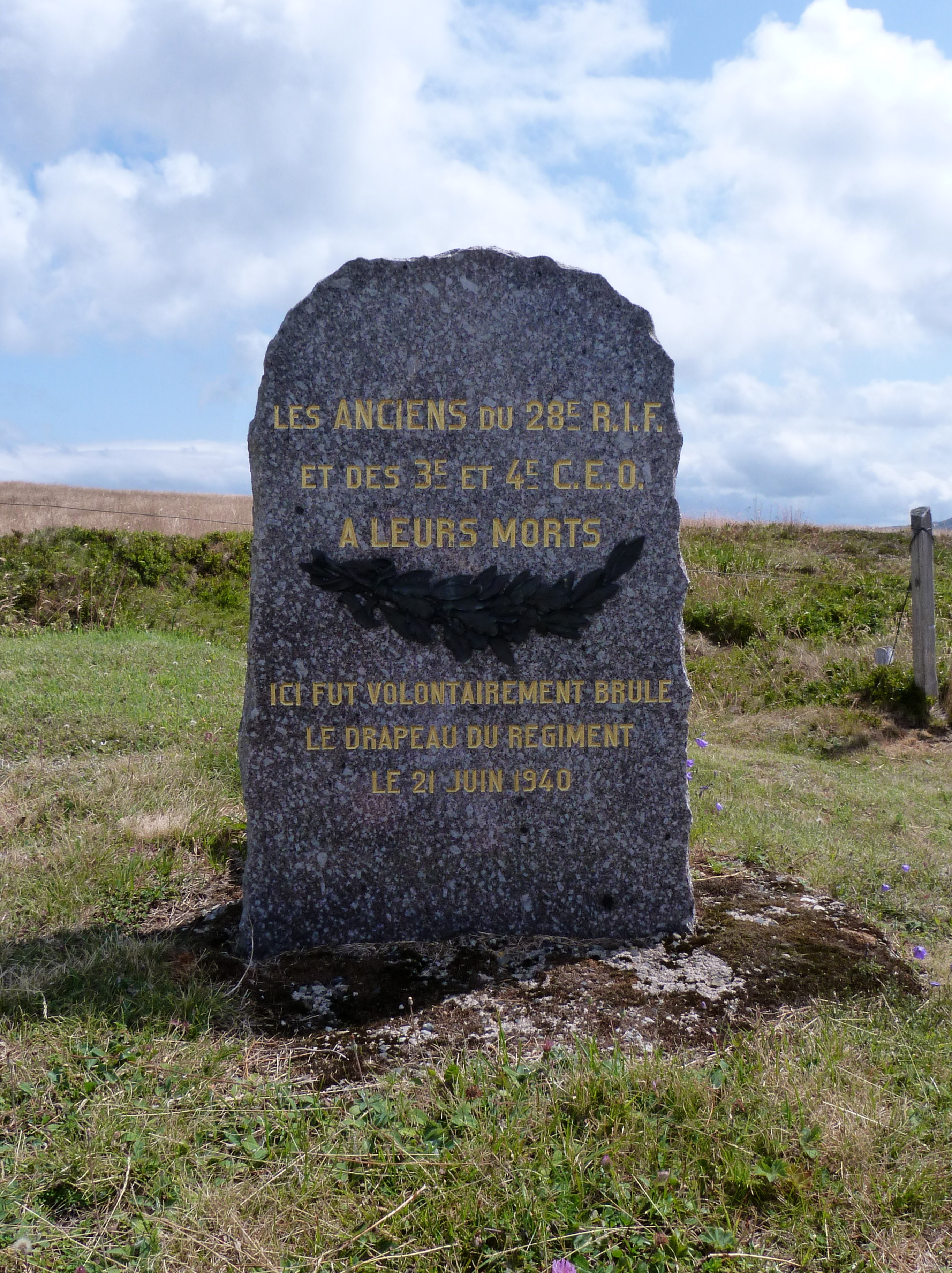 Monument au 28e RIF sur les crêtes vosgiennes, entre le Markstein et le Breitfirst.